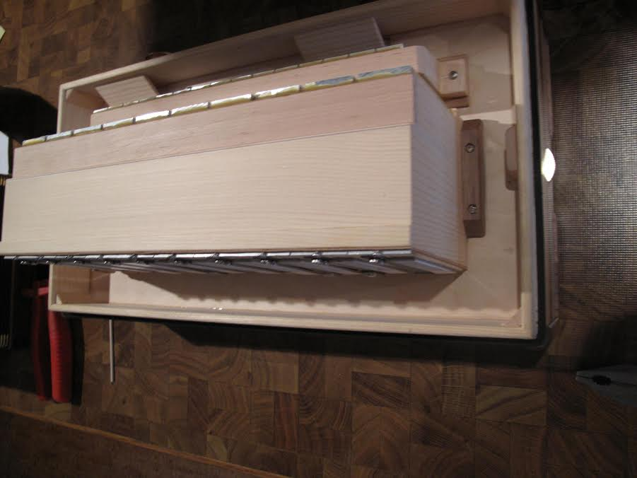 Stehender Einzelhelikon mit zusätzlichen Terzetti Stimmplatten, Sondermodelle von Alpengold, FISMEN, ...